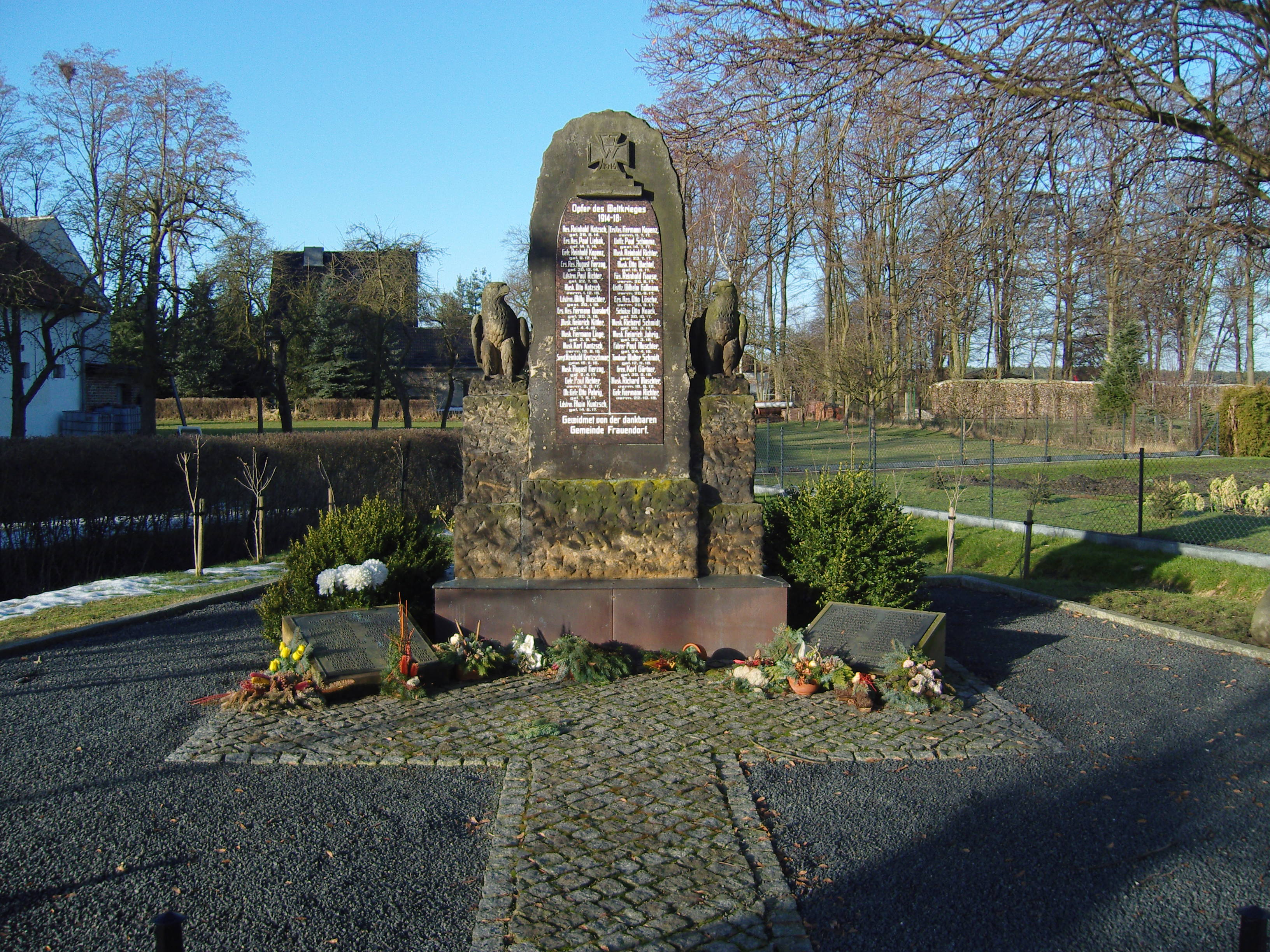 Kriegerdenkmal für die Gefallenen des Ersten Weltkriegs in Frauendorf (Brandenburg), vor dem Denkmal sind Gedenktafeln für die Gefallenen der Zweiten Weltkriegs angebracht